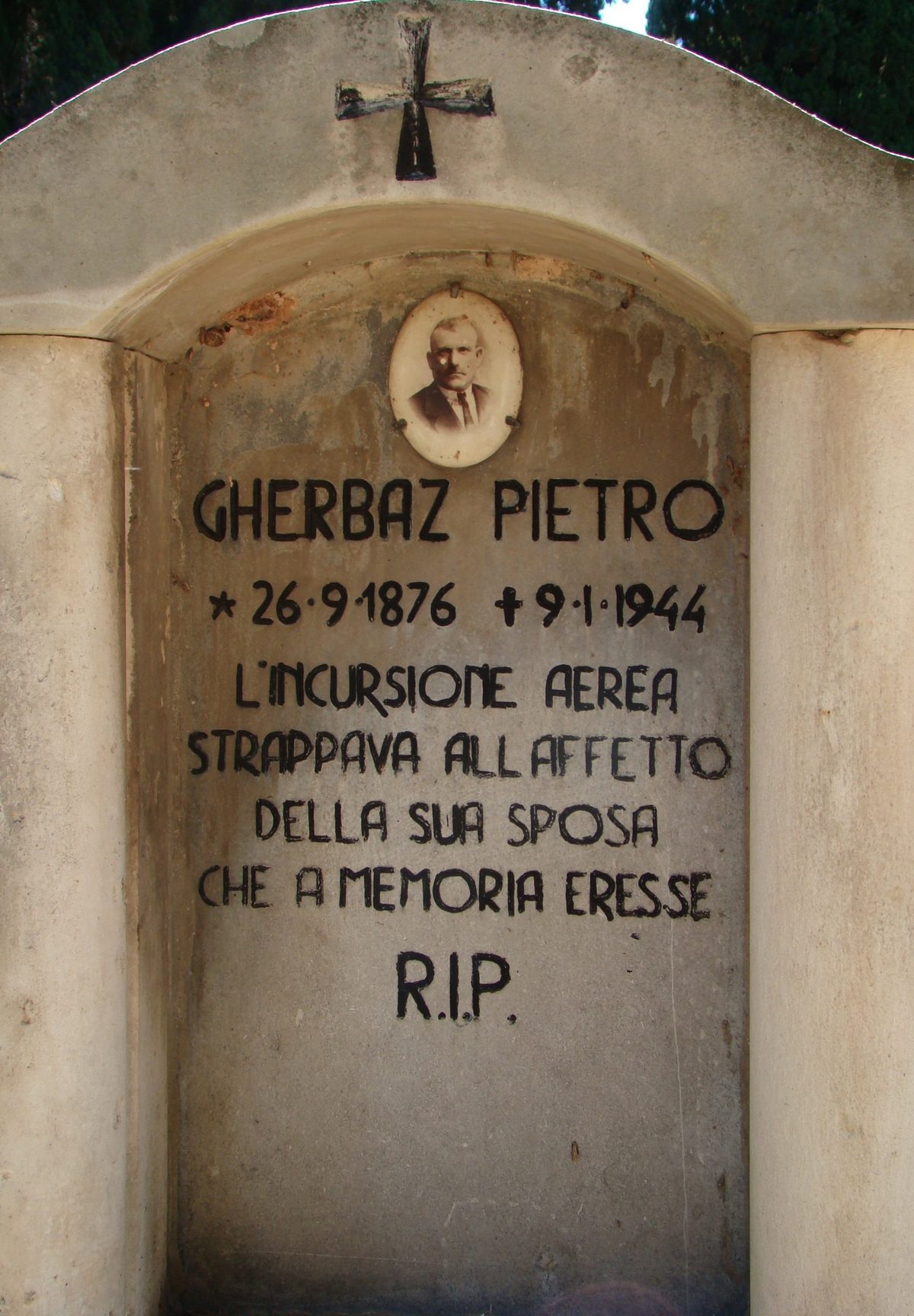 Jedna od žrtava u savezničkom bombardiranju Pule 9. I. 1944.